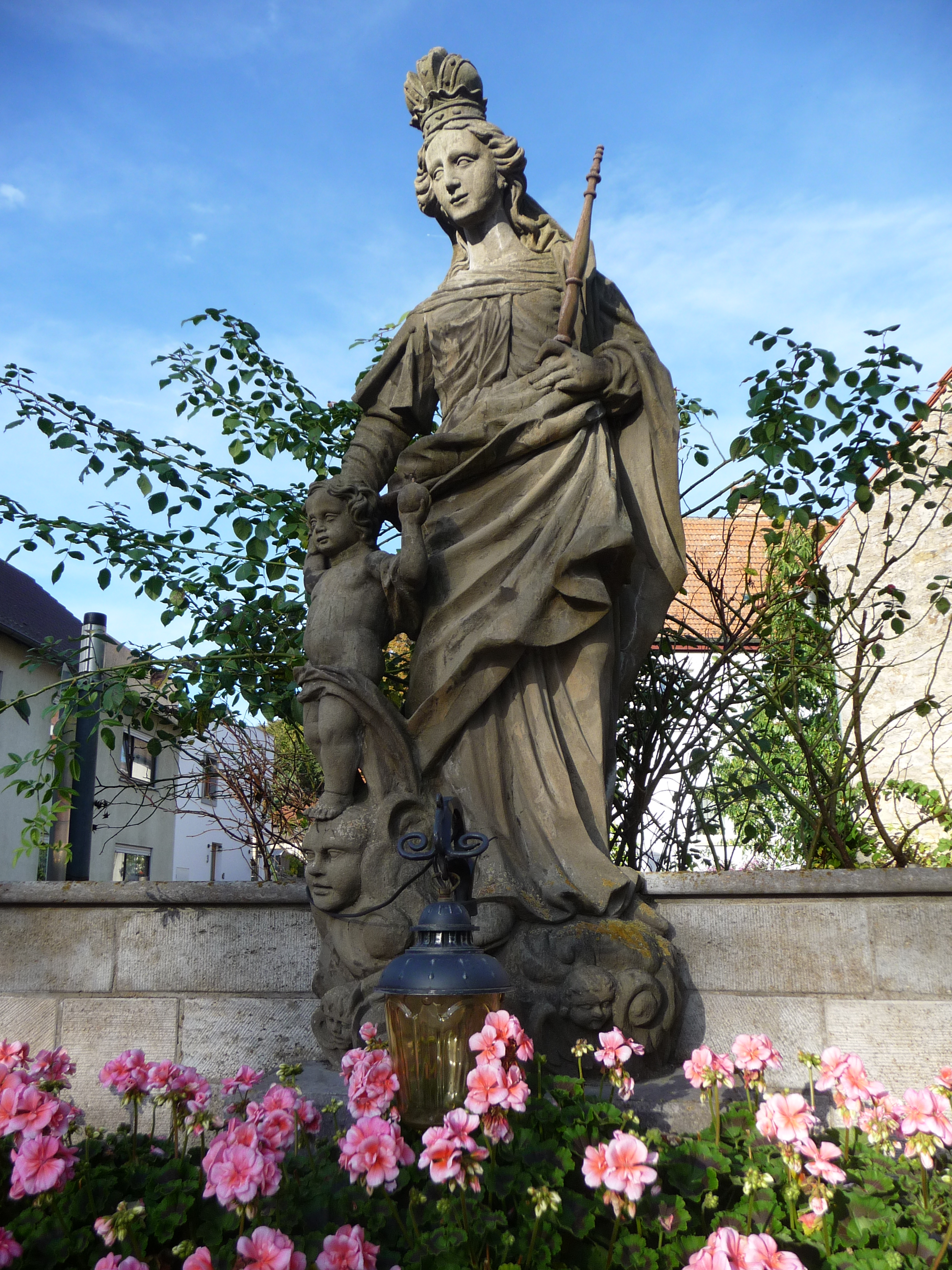 Figur St. Maria De Victoria in Theilheim